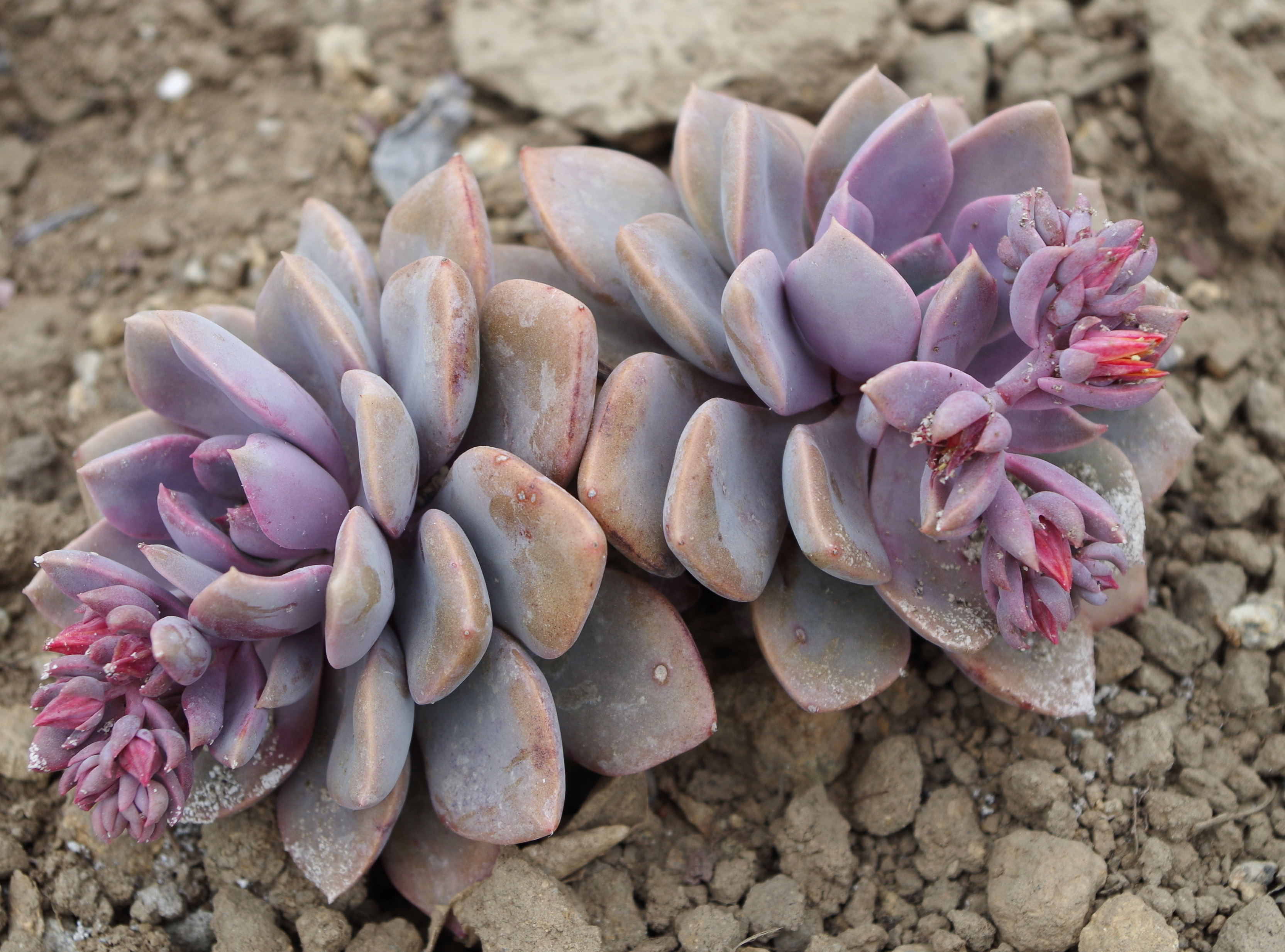 X Graptoveria Debbi - Jardin botanique de Roscoff